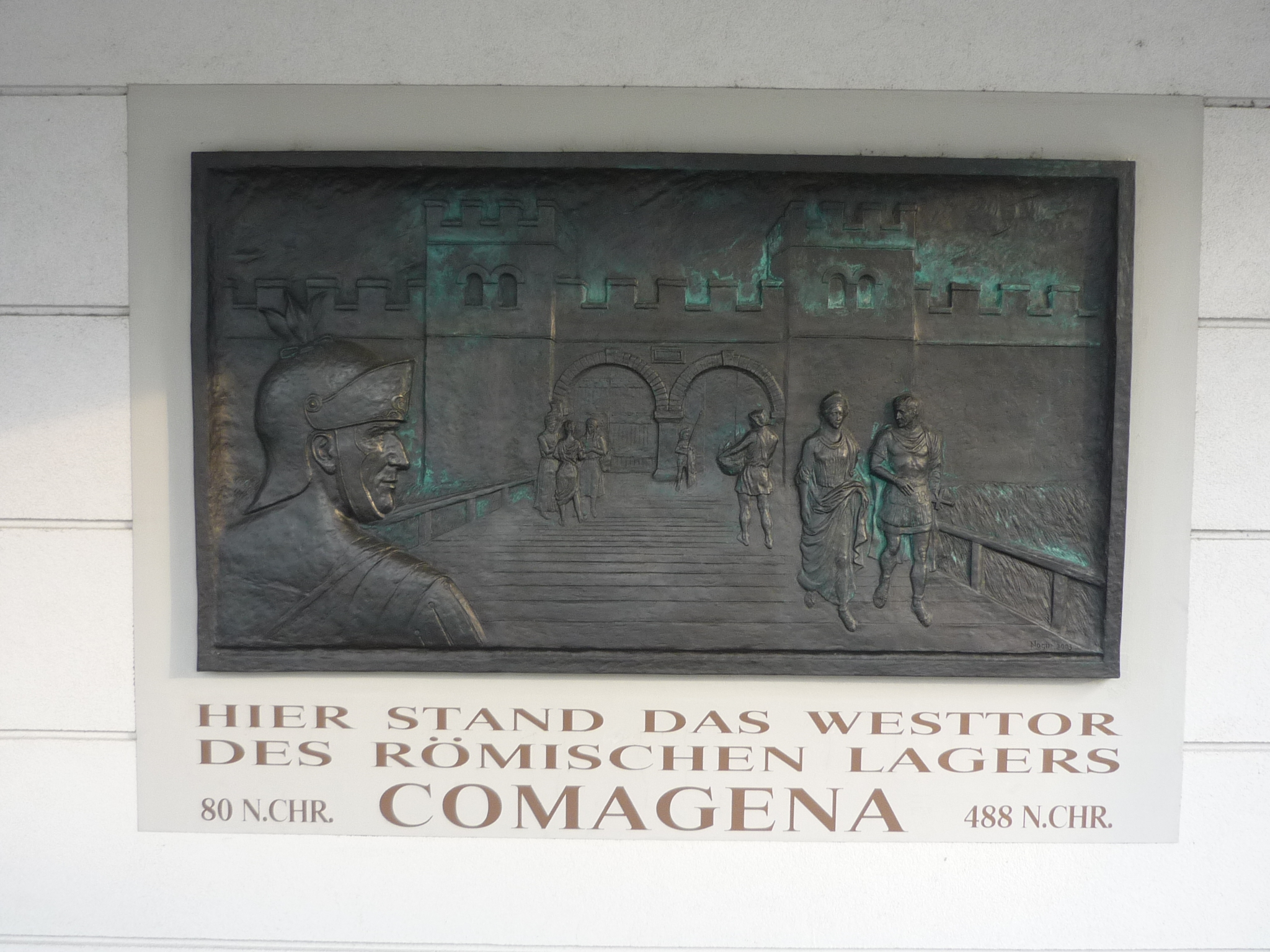 Tafel angebracht an der wahrscheinliche Position des westlichen Lagertors mit Abbildung der Porta principalis sinistra